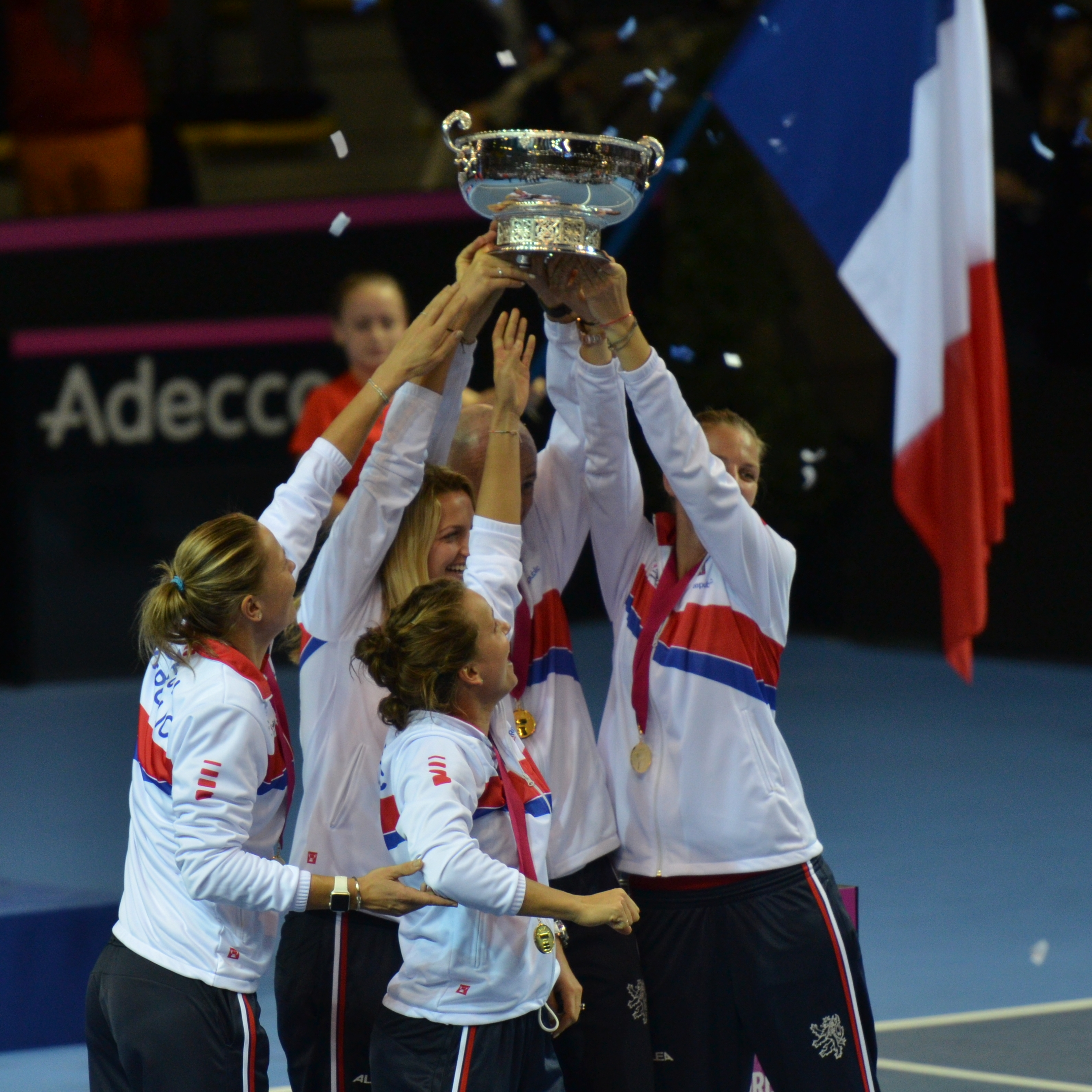 PPP_3506